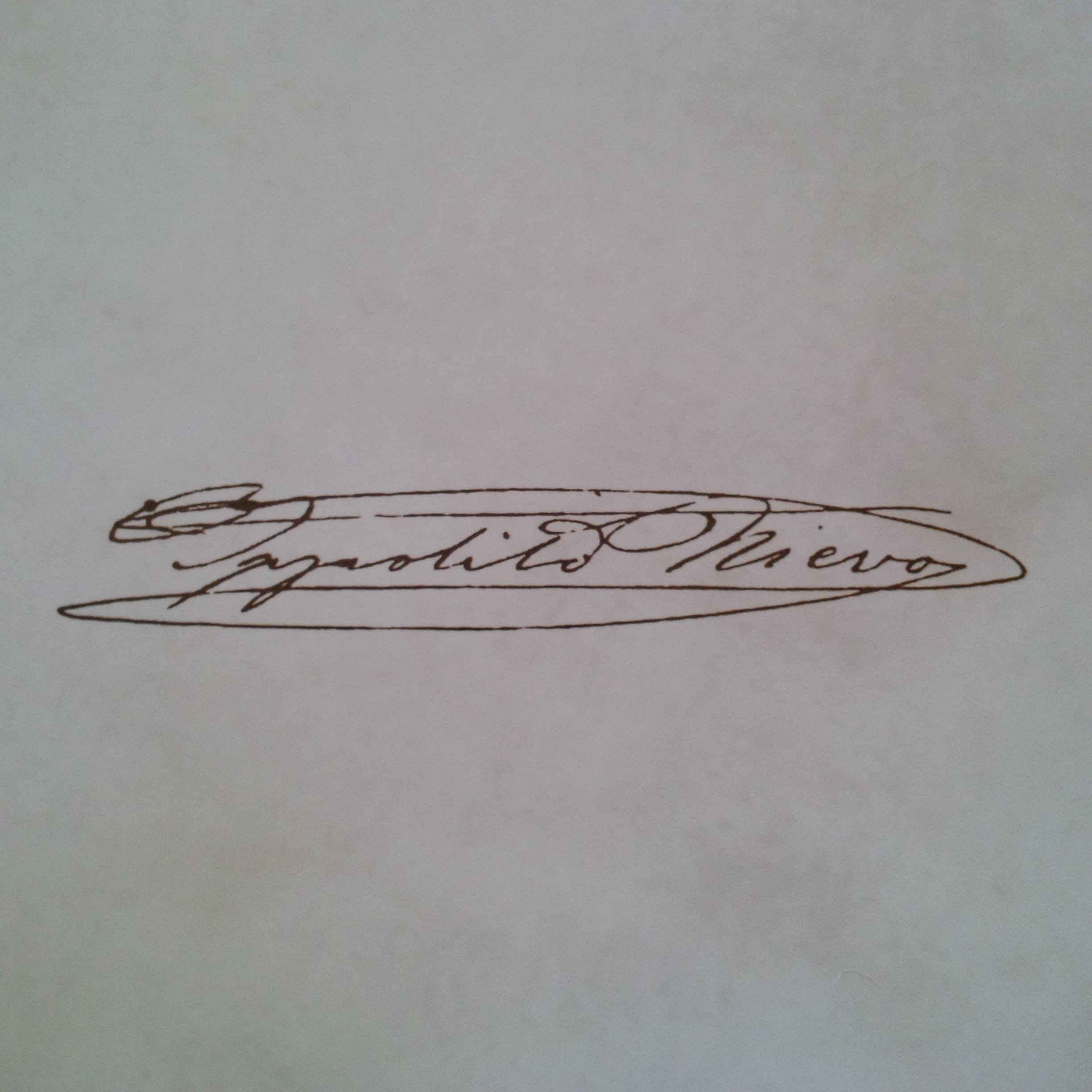 Autografo di Ippolito Nievo